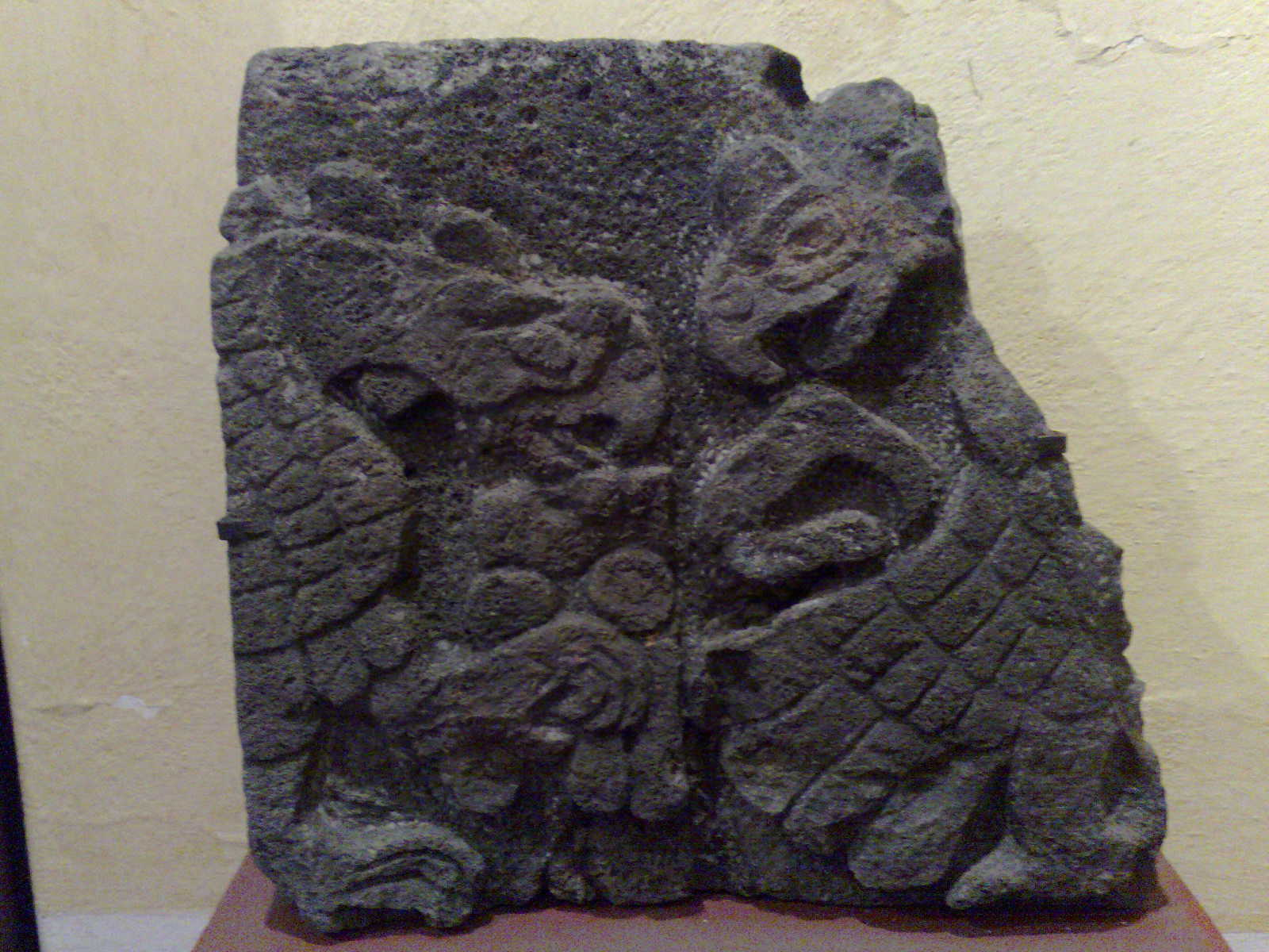 Fragmentos de la pirámide de Santa Cecilia Acatitlán